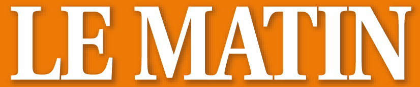 Logo du quotidien suisse Le Matin en 2010.